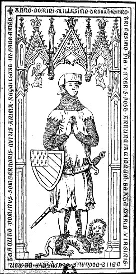 Étienne de Montagu, seigneur de Sombernon († ~1339 ?). Inscription du pourtour, commençant au coin sup. gauche : "anno•domini•millesimo•triaesimo•dia•venaris•post•annunciacionum•beata•maria•virginis•obiit•dominus•stephanus•de•montea*nto•dominus•sombernonis•***s•anima•requiescat•in•pace•amen". (latin à vérifier)